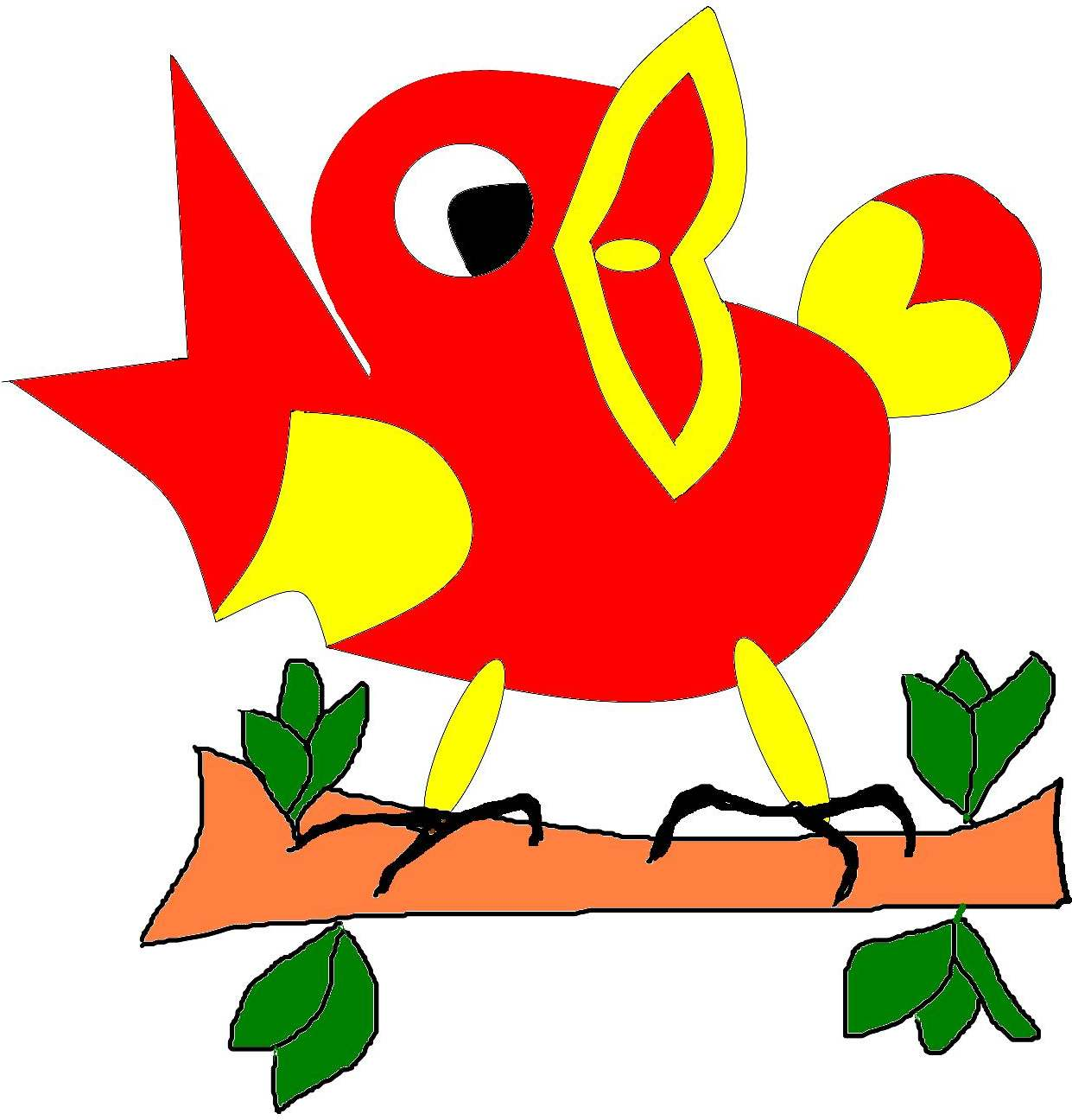 Das Vögelchen von Vogelsang, es entstand in den 1950er Jahren nach Übernahme von Vogelsang durch die Belgier. Das zwei Meter hohe Emblem steht auch 2016 noch auf dem Wasserturm in Camp Vogelsang. Es wurde entworfen von dem deutschen Zivilangestellten Robert Krämer aus Sistig, der von 1950-1988 dort beschäftigt war.